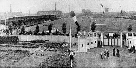 Vue générale du stade Amédée-Prouvost à Roubaix